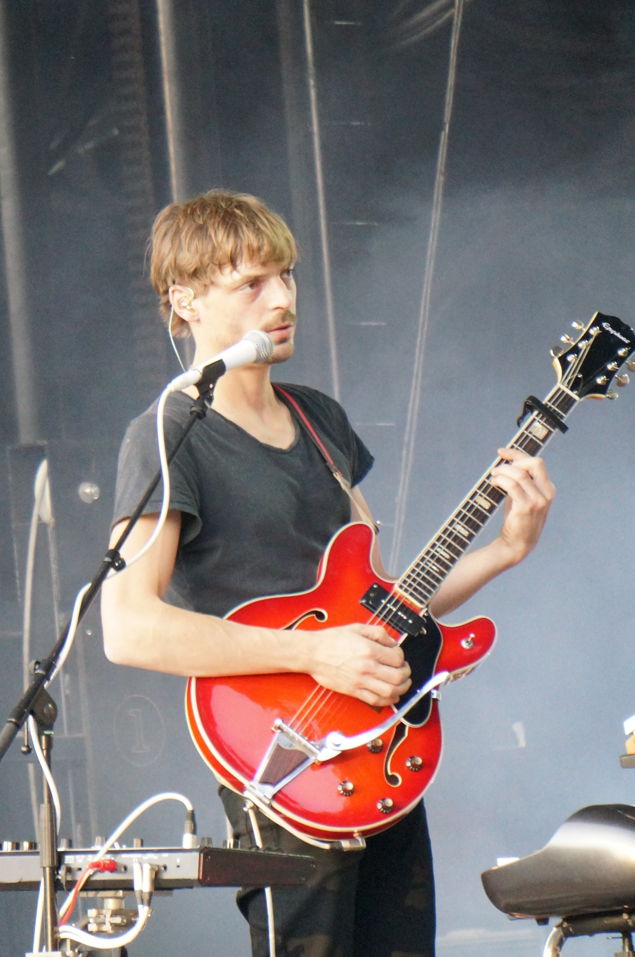 Clément Daquin lors de Elektricity XII.